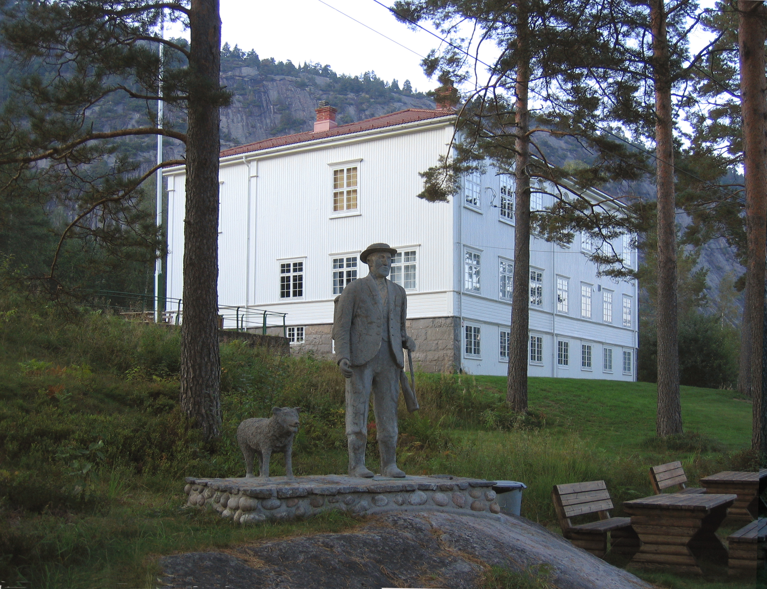 Elvarheim museum, Åmli i Aust-Agder